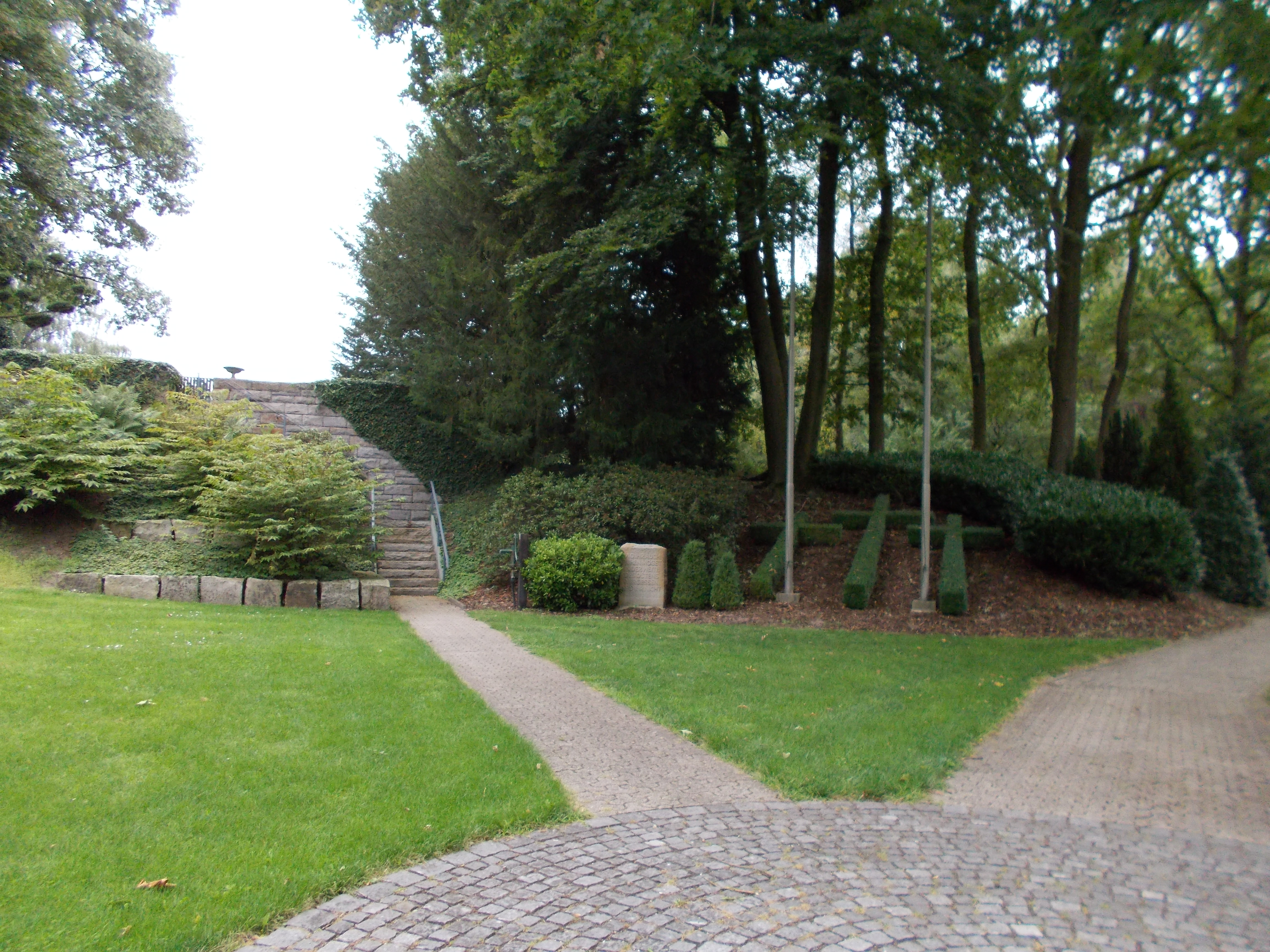 Der Friedhofsvorplatz der Kriegsgräberstätte Weeze wurde 2010 neu gestaltet. Die Buchsbaumkreuze und die steinerne Steele sind zum Gedenken an die Soldaten an der Ostfront errichtet worden.